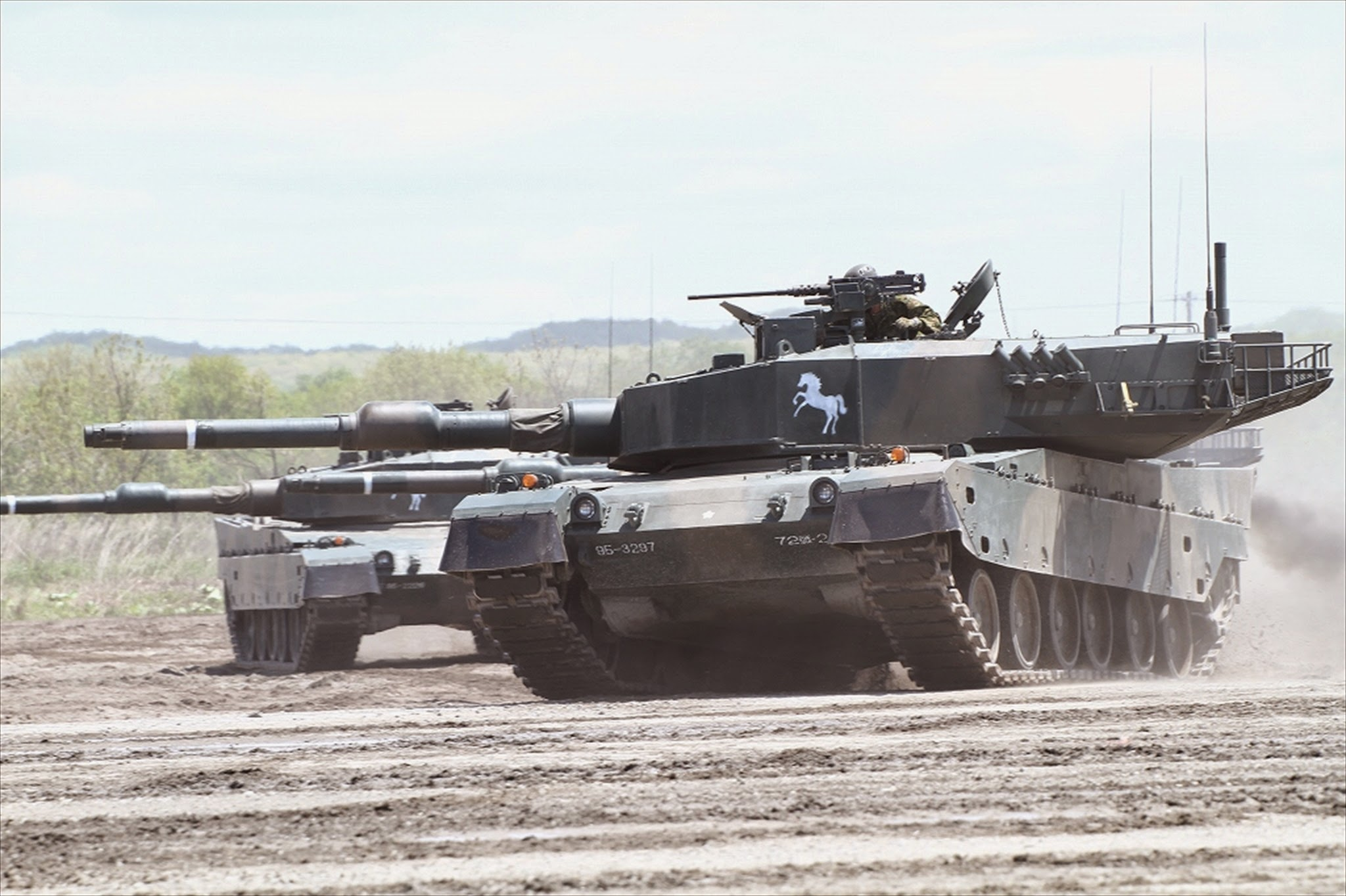 ９０式戦車（創立記念行事訓練展示・第７２戦車連隊）